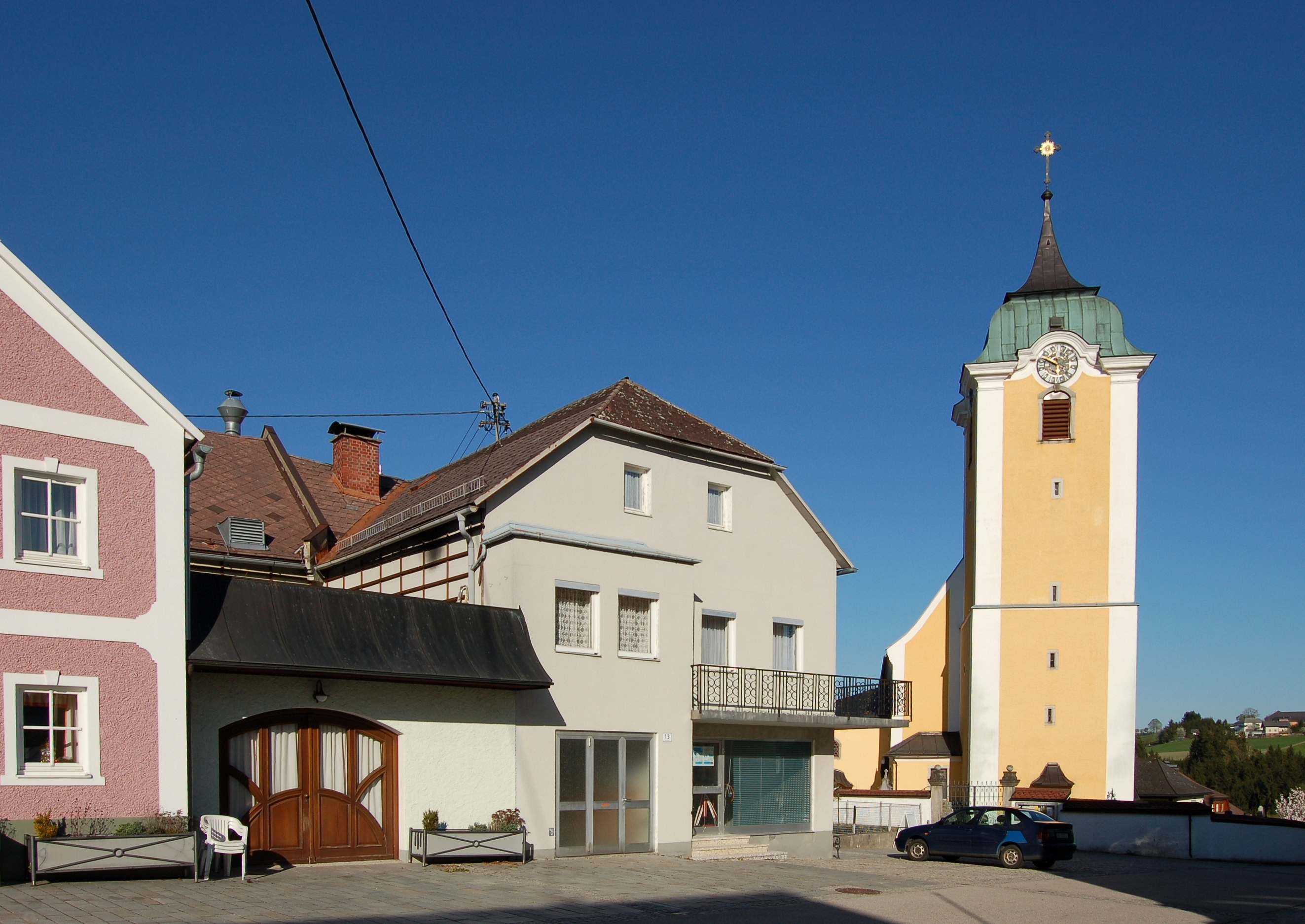 Das denkmalgeschützte Bürgerhaus am Marktplatz 13 in Neufelden im Bezirk Rohrbach (Oberösterreich) diente bis 1898 als Schule. Rechts daneben die denkmalgeschützte Pfarrkirche.